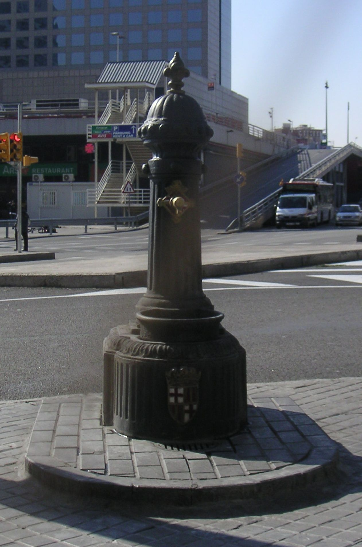 Font pública d'aigua corrent a Barcelona, de tipus columna d'una aixeta i amb l'escut de la ciutat. A Barcelona hi ha més de 1.500 fonts.